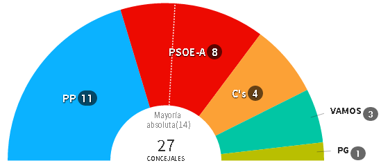 Gráfico de los resultados autonómicos en Granada